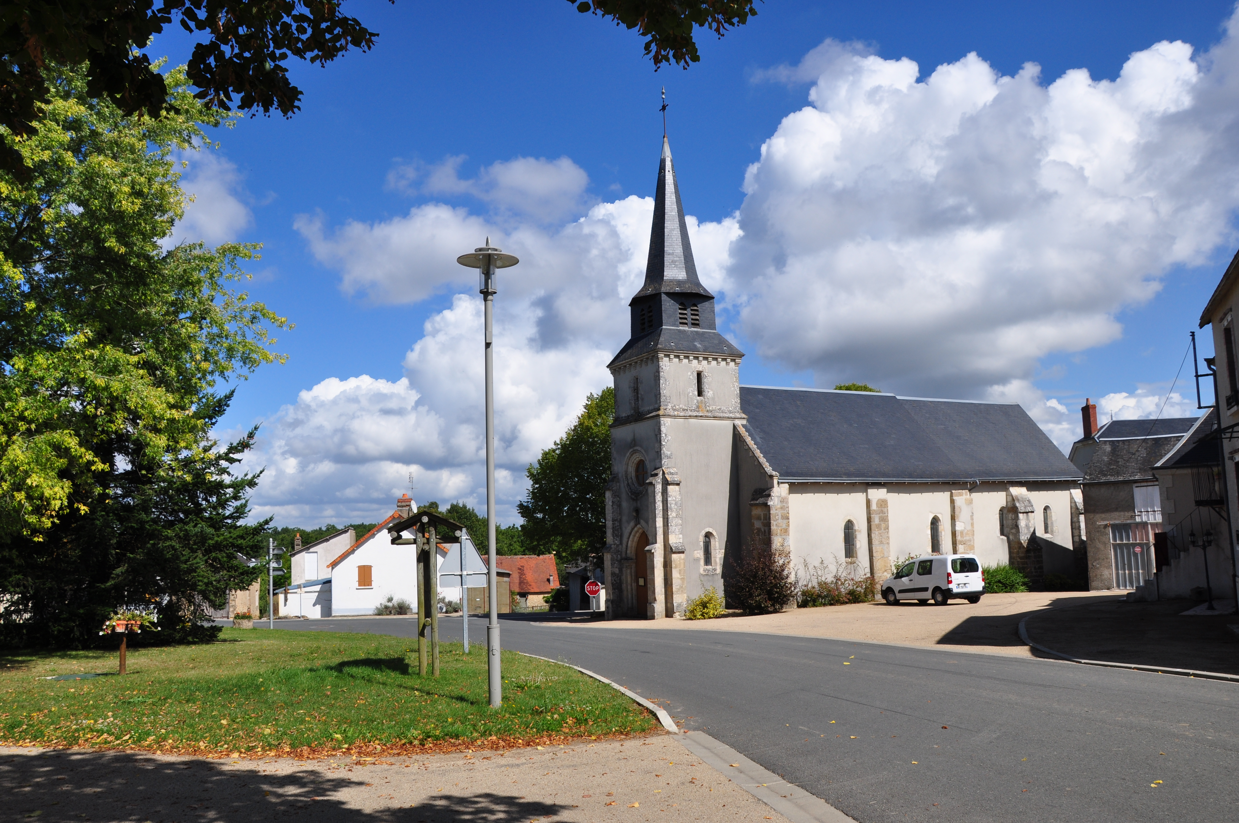 Malicornay (Indre) - Place de l'église